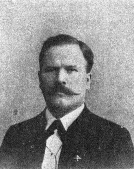 Österreichischer Politiker, Reichsratswahl 1907, Name siehe Dateiname